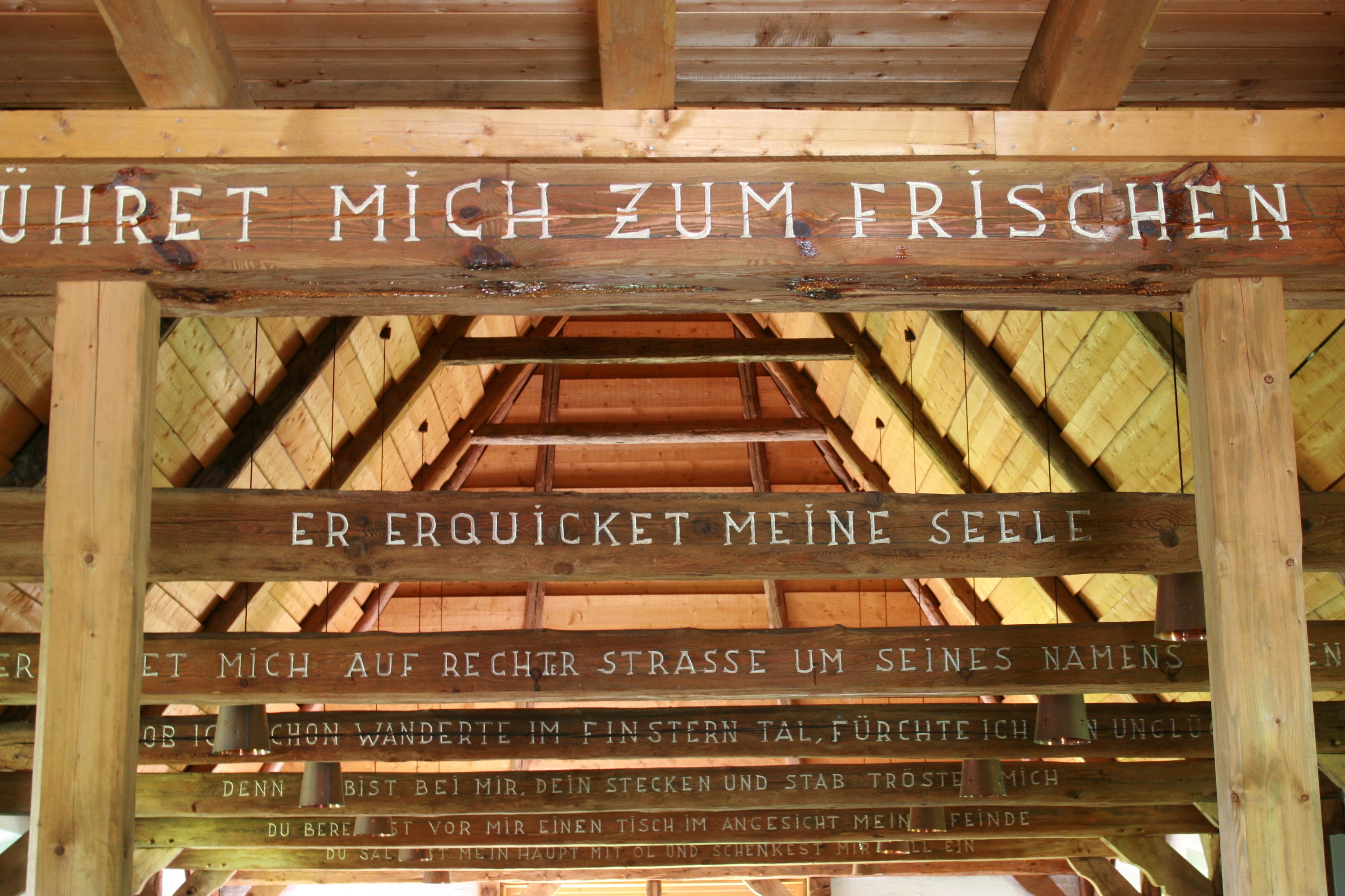 Verse von Psalm 23 auf den Kehlbalken der Schafstallkirche St. Martin in Munster (Örtze)